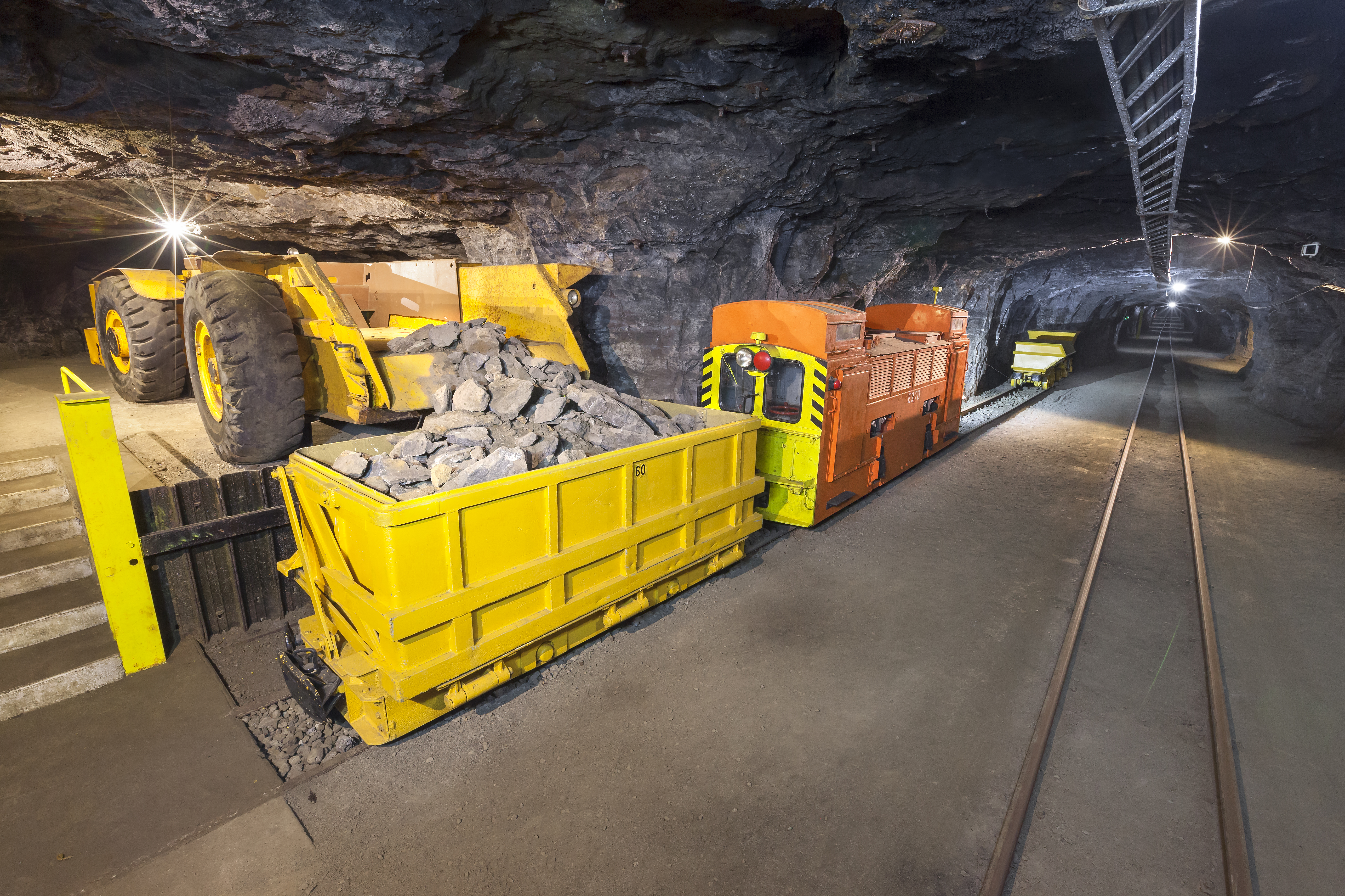 Besucherstollen des Museums